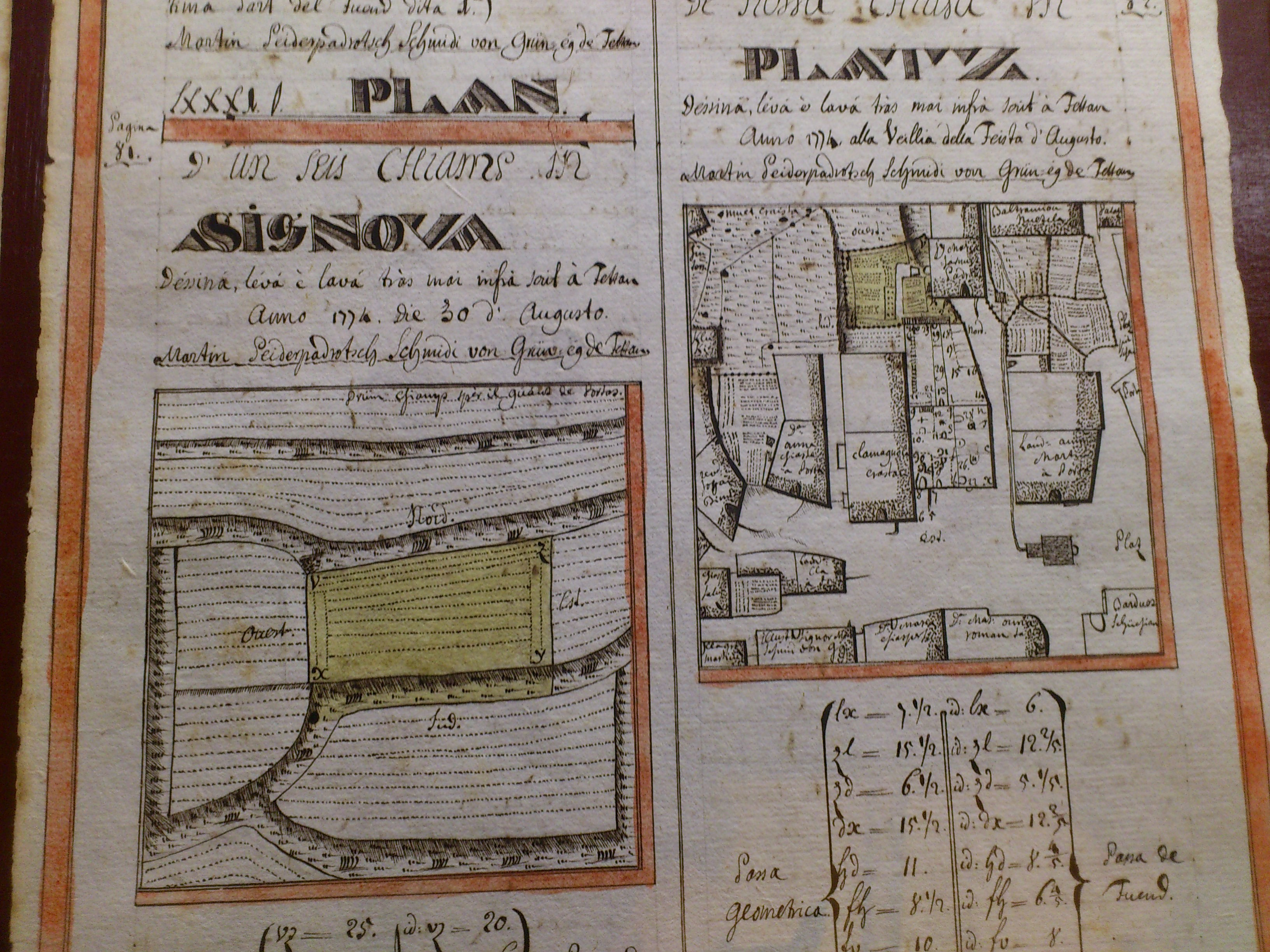 Gezeichnete Pläne von Feldern und Häusern im Dorf Ftan (Unterengadin, Schweiz) aus der romanische Handschrift Chiantun Verd von Martin Peider Schmid (1743-1821). Historisches Lexikon der Schweiz